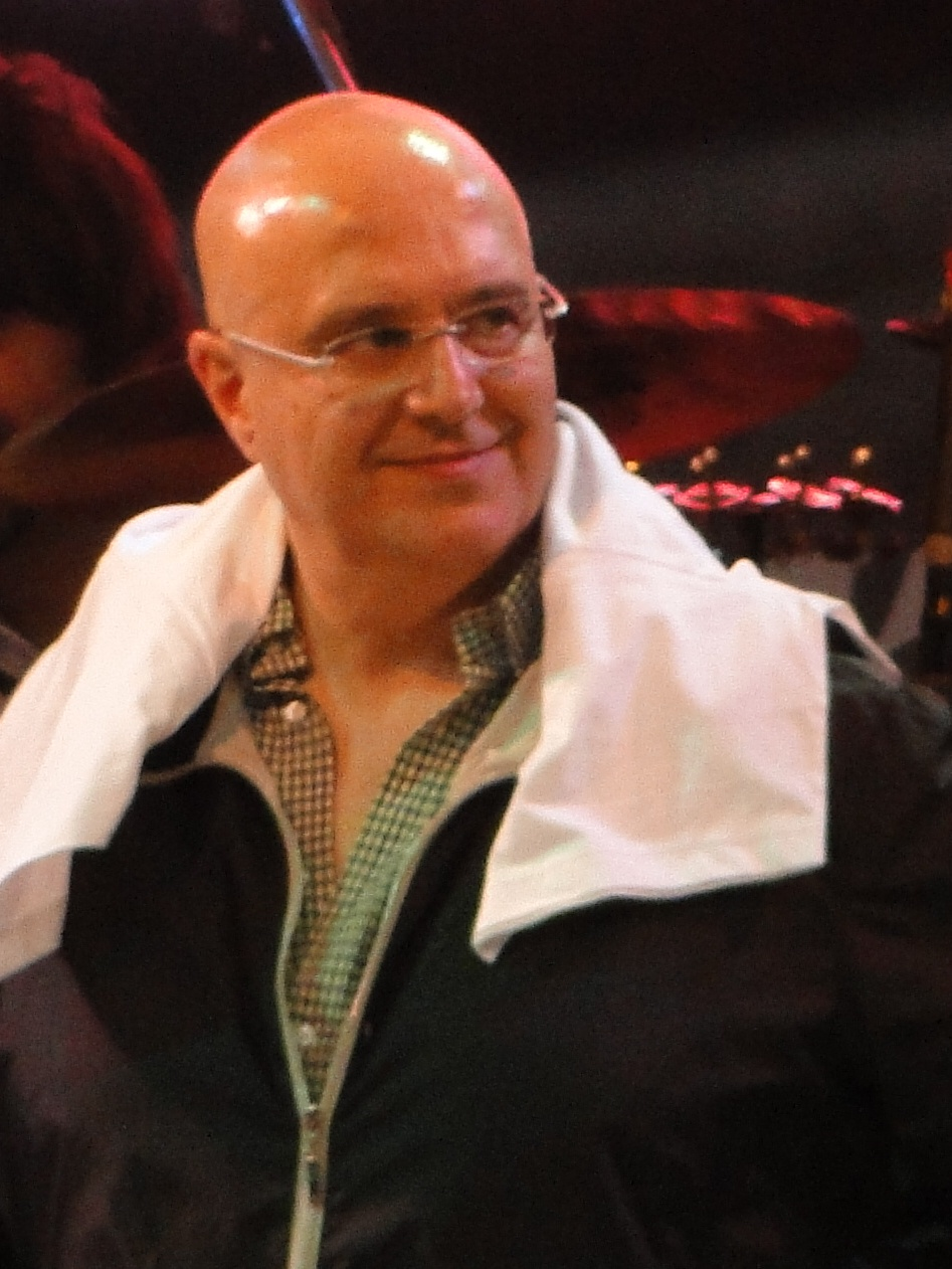 Pierpaolo Marino, dirigente dell'Atalanta B.C.